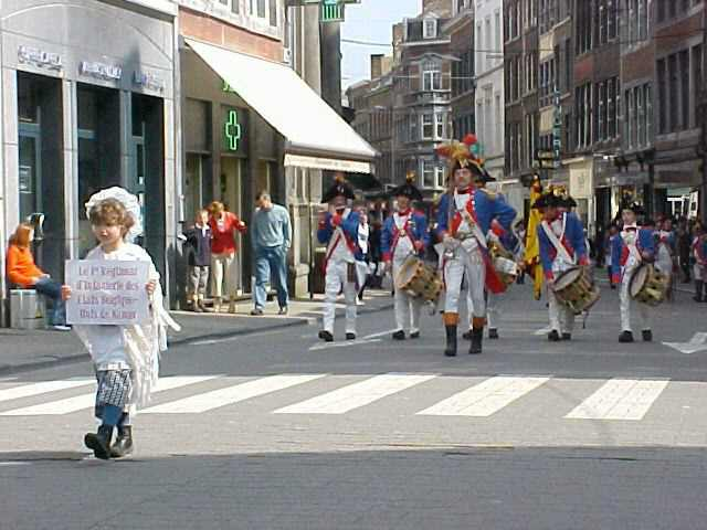 1er régiment Etats Belgique Unis